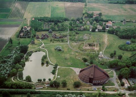 Ópusztaszer, Hungary, aerialphotography